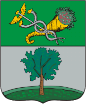 COA Bogoduchow 1781